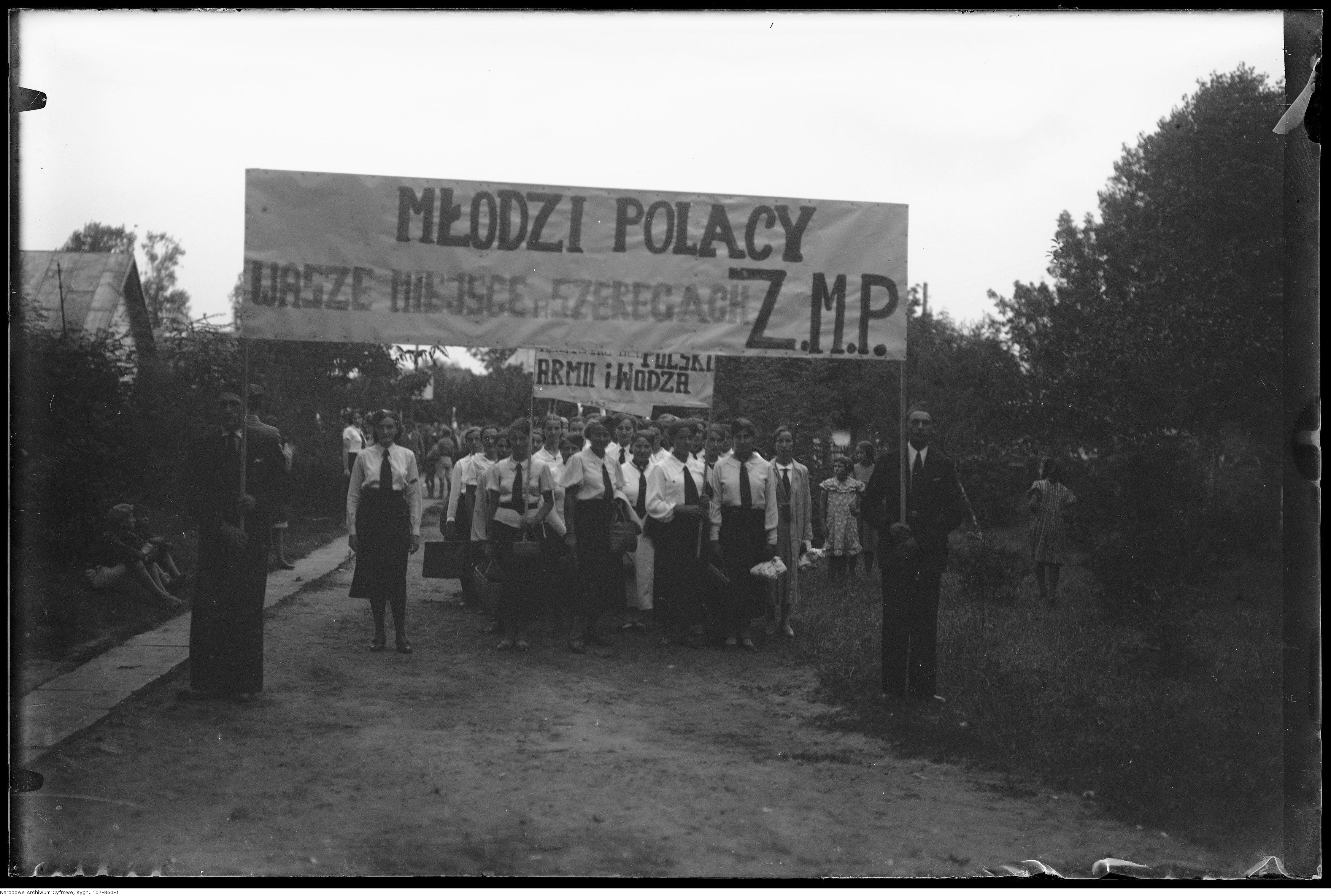 Czoło pochodu.